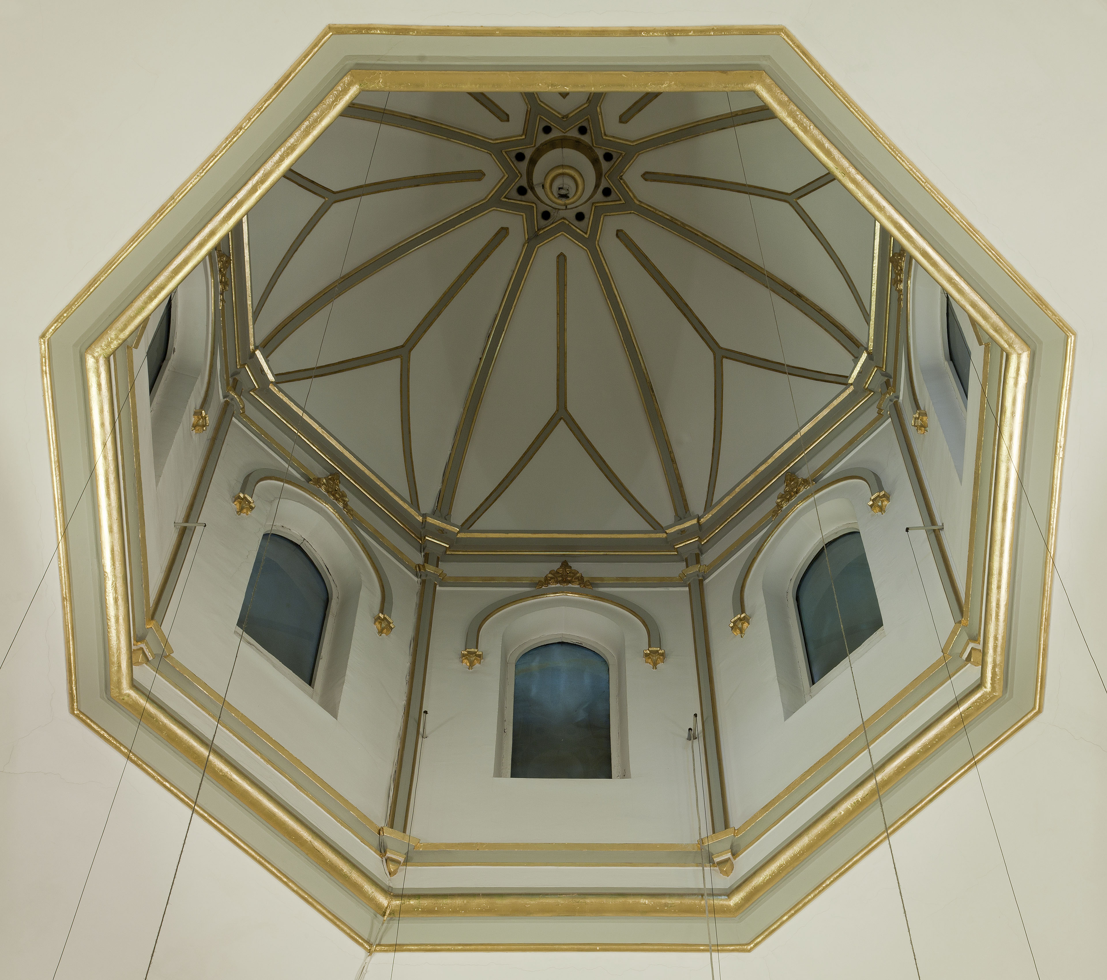 cupula por dentro de la sede de Carlos de Amberes